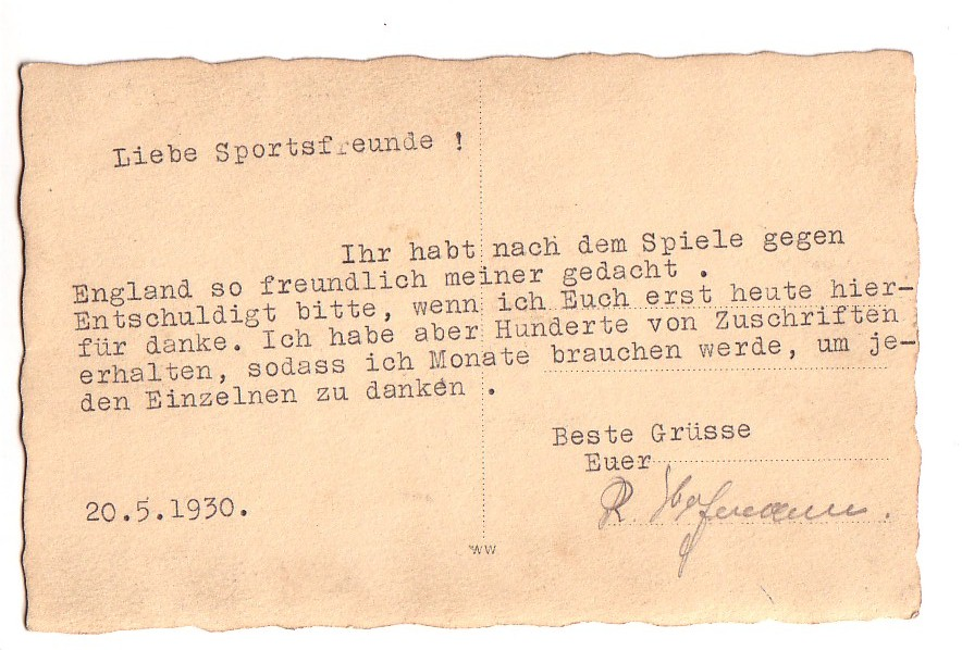 Autogramm von Richard Hofmann von 1930 Persönliche Widmung an Freunde